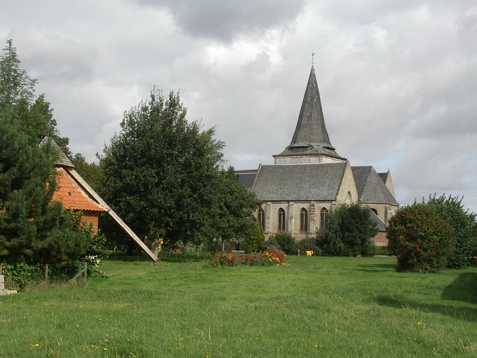 Eglise de Volckerinckhove (France).